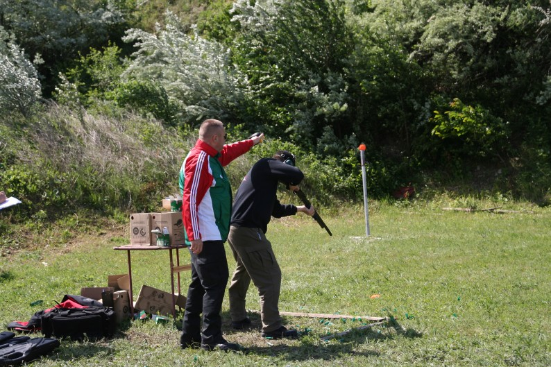 Rapid shooting sörétes verseny: versenybíró stopperral és a lövész puskájával